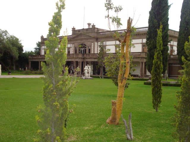 Casa de la Cultura en San Luis Potosí, México.